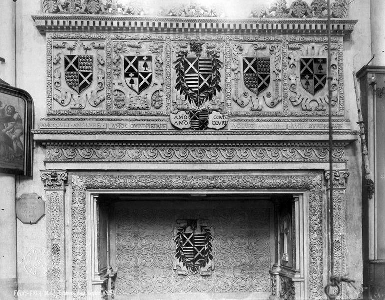 1575 1860 (restauration) Photographie de Robert, Paul (1866-1898)